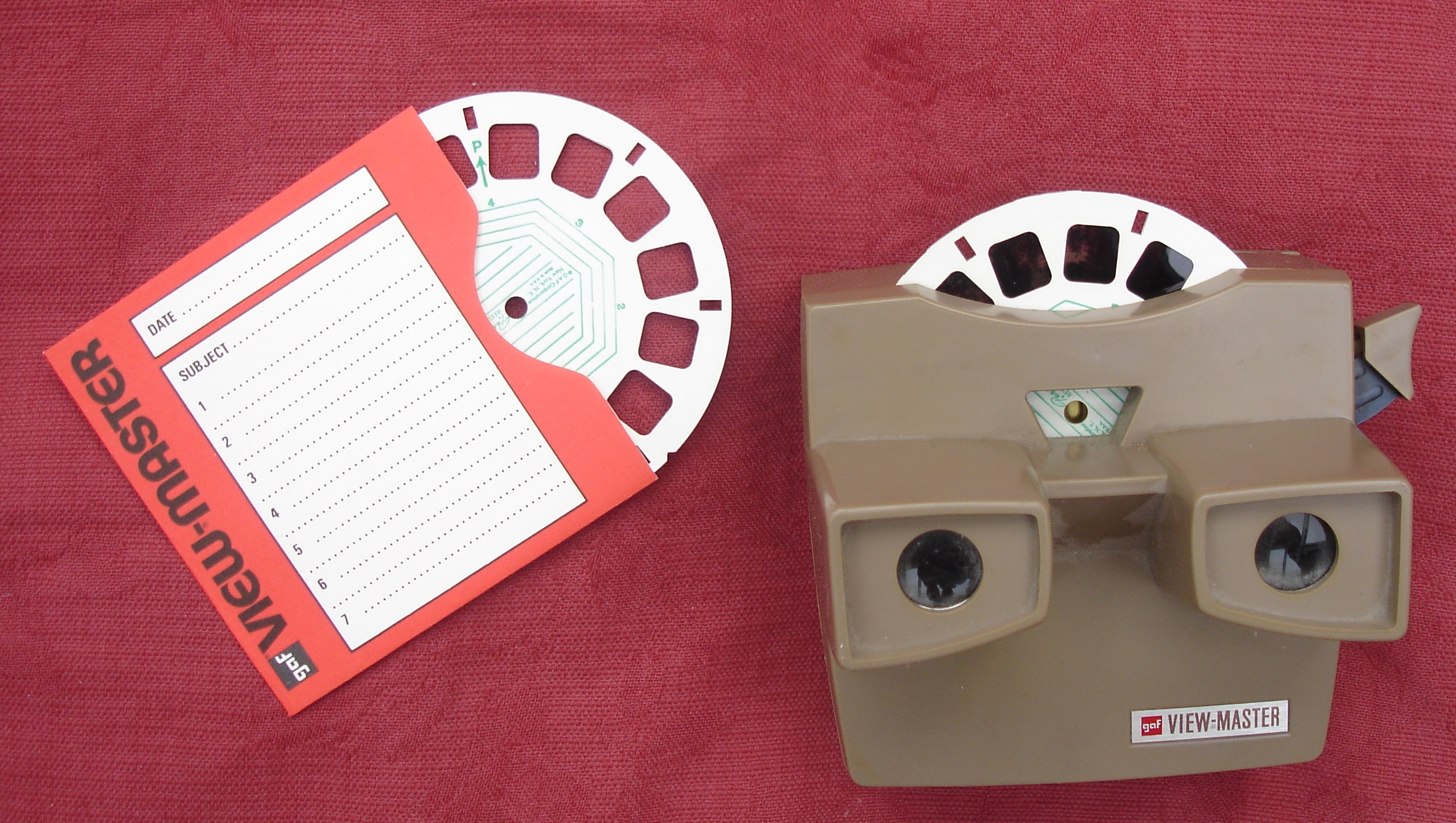 Stereoscoop